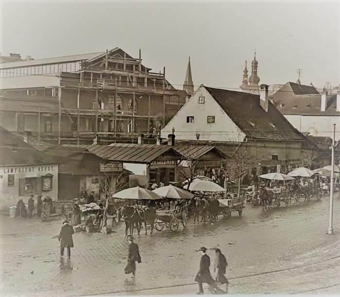 Im Haus mit Deiecksgiebel im Vordergrund war das Gasthaus "Flucht aus Ägypten" untergebracht.